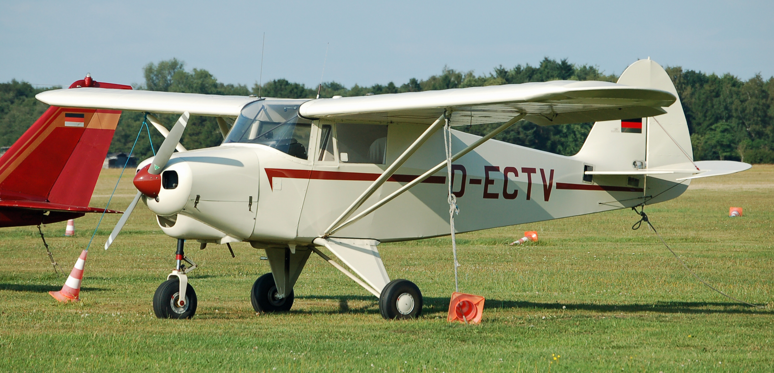 Piper PA-22 Colt (D-ECTV) auf dem Flugplatz Uetersen